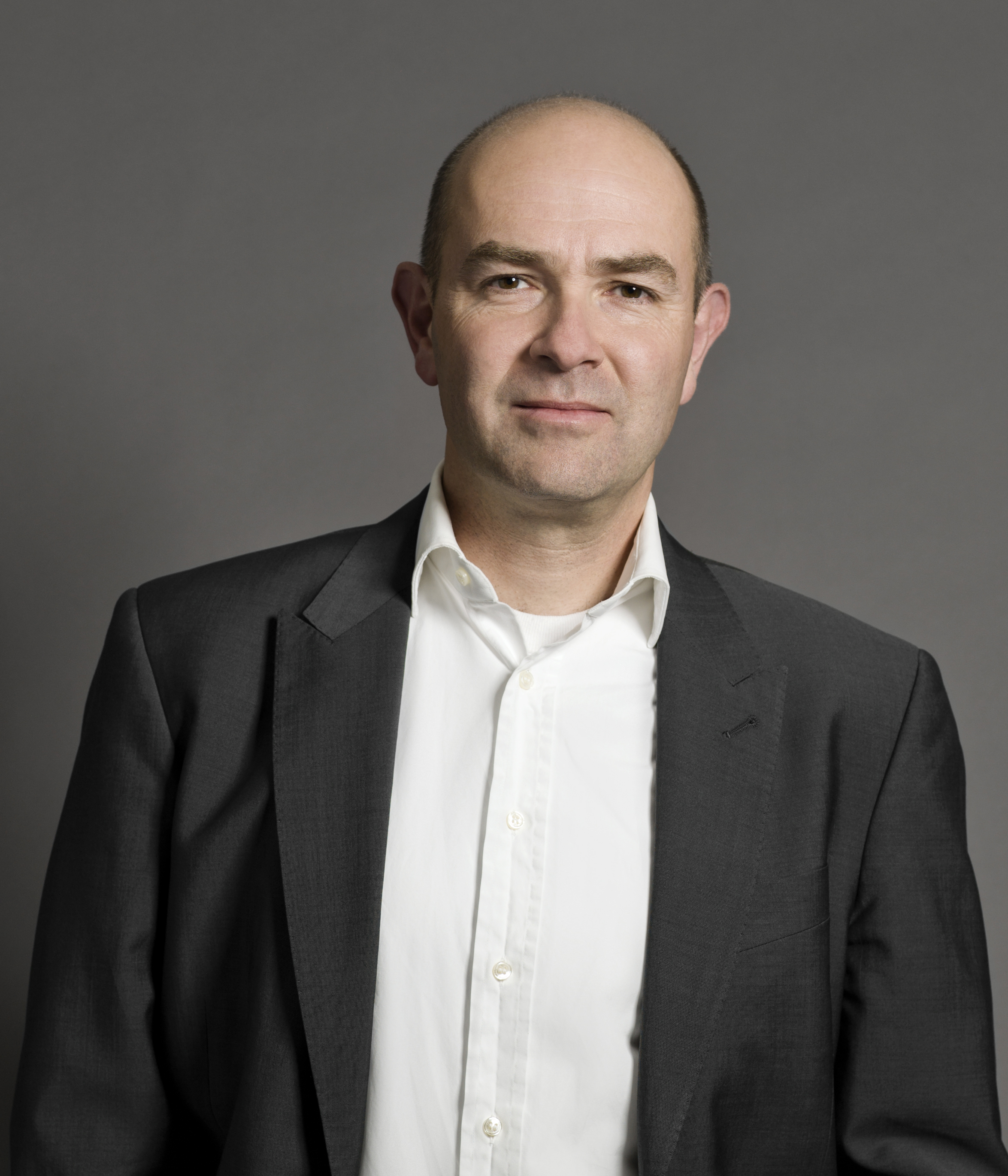 Palestrantes Magistrais e Destaques da CPBR8